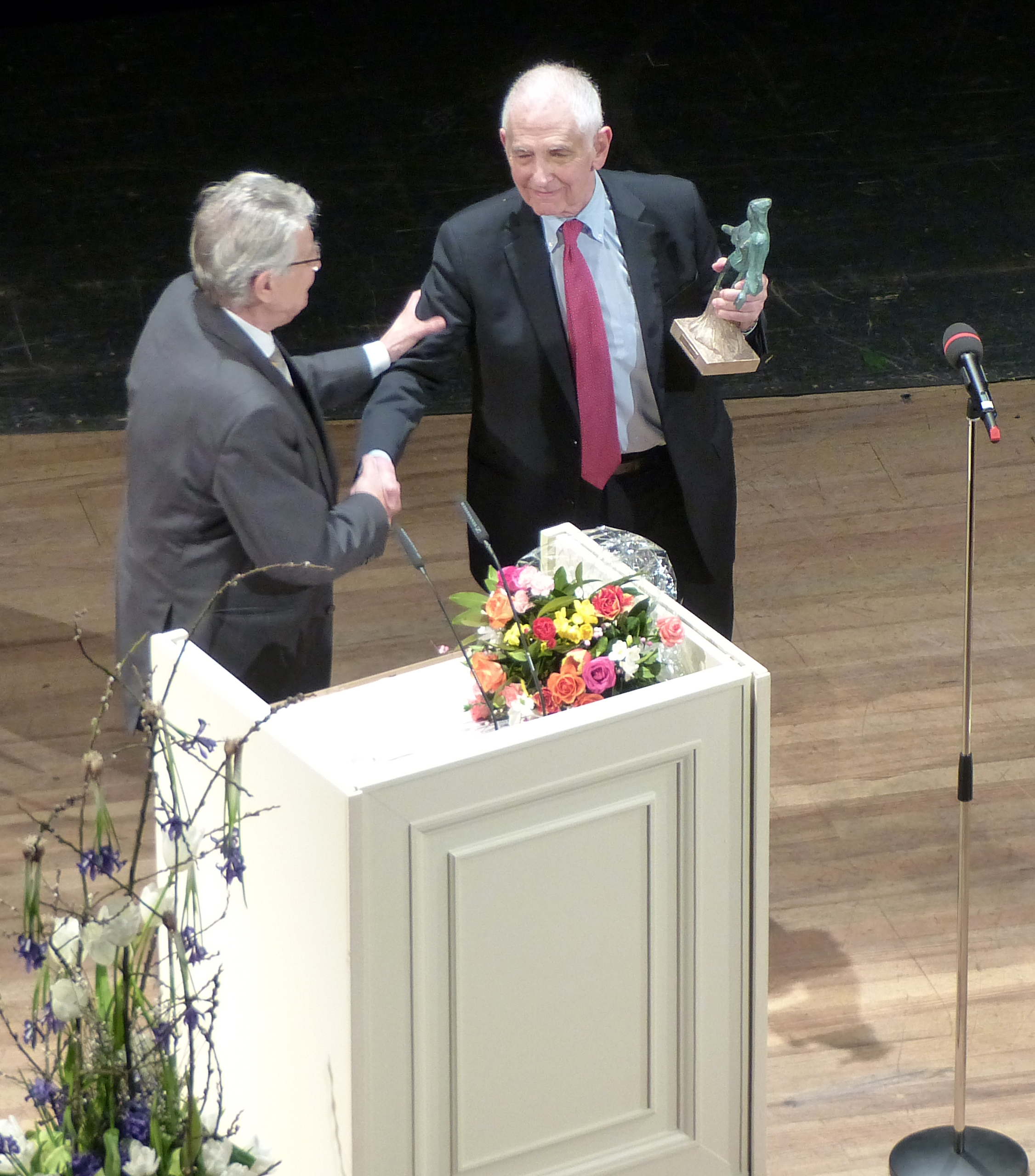 Daniel Ellsberg in Dresden anlässlich seiner Auszeichnung mit dem Dresdner Friedenspreis am 21.2.2016 in der Semperoper, mit Gerhart Baum (Moderator) und Jakob Augstein (Laudator) sowie Bui Truong Binh (Preisübergeber)